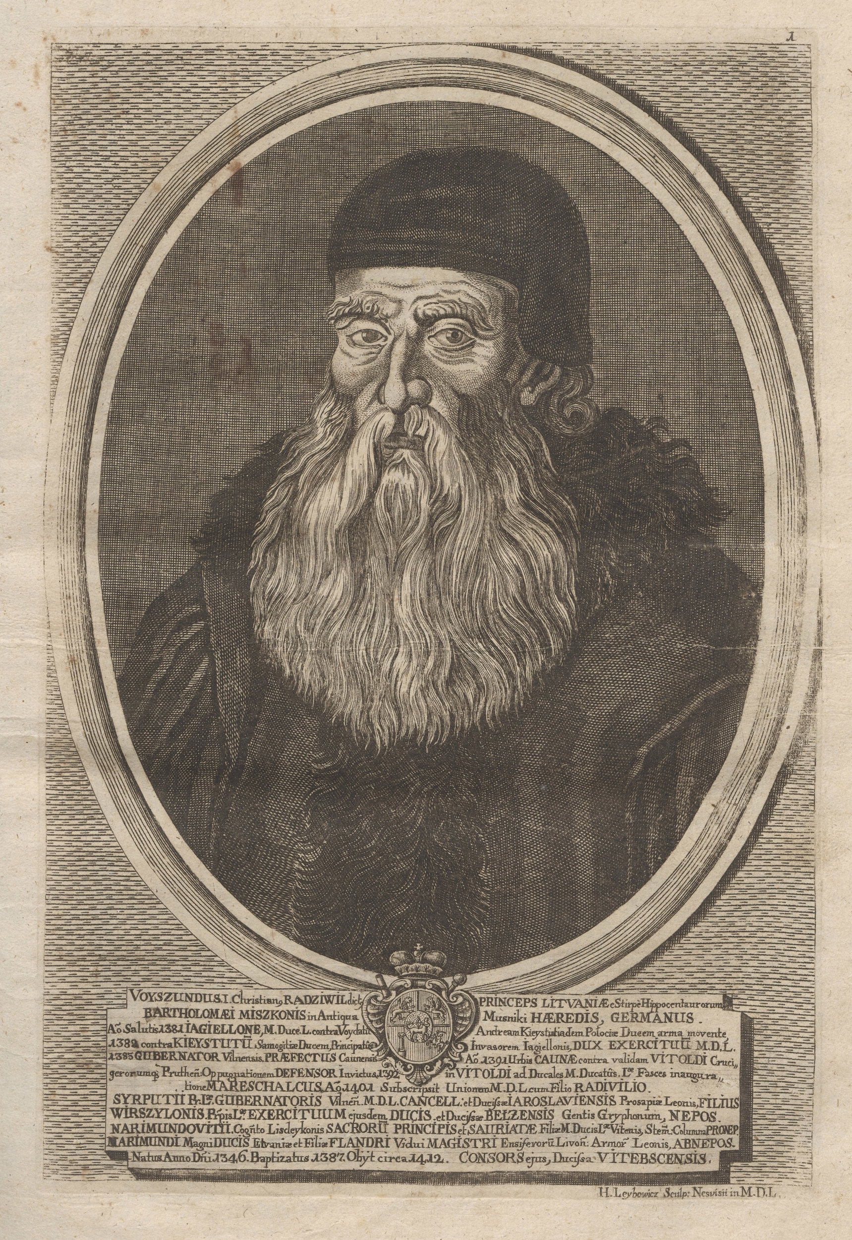 Беларуская (тарашкевіца): Партрэт Вайшунда (Vajšund), легендарнага пачынальніка роду Радзівілаў (Radzivił)